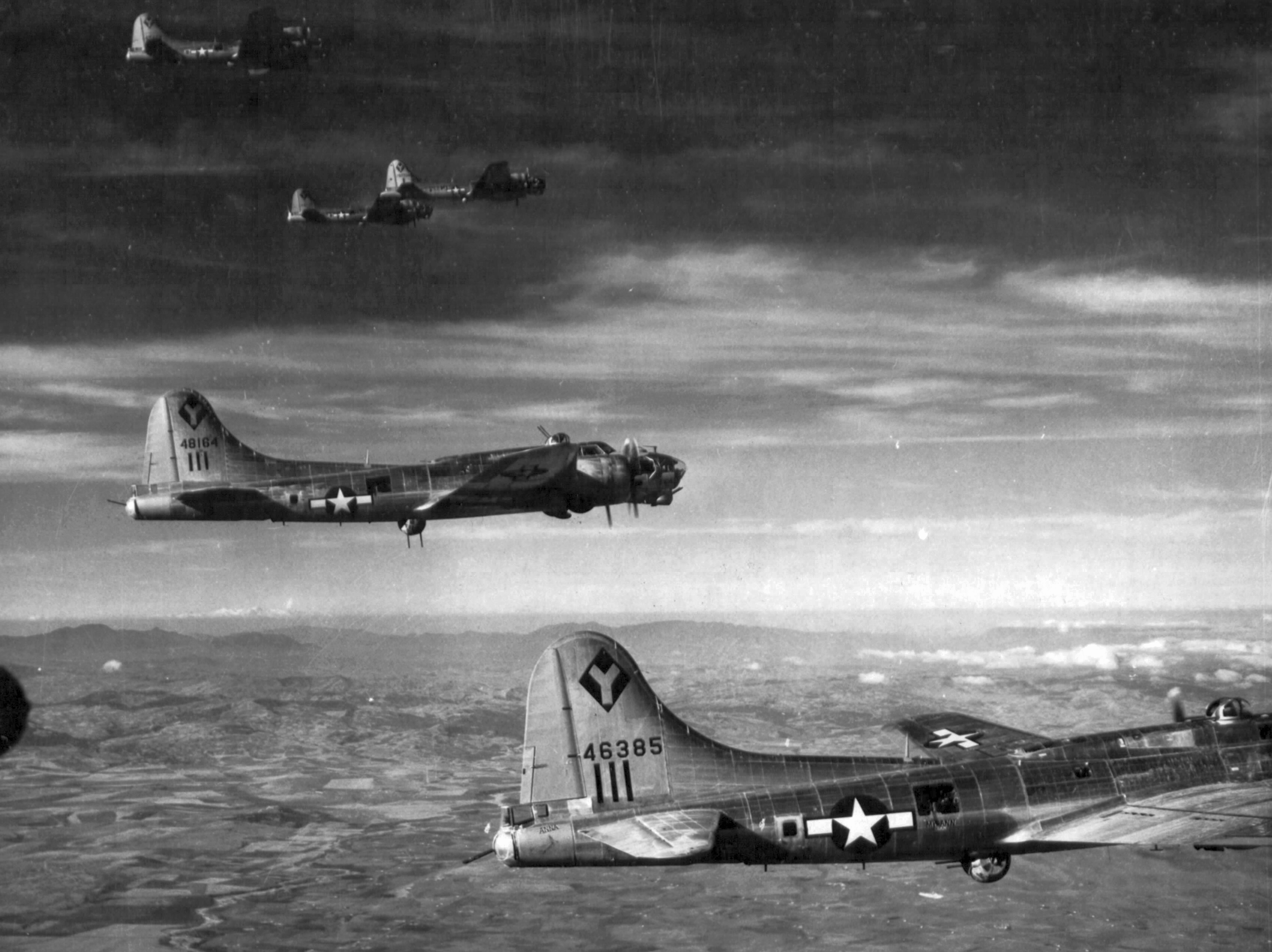 B-17 Flying Fortress bombázógépek a szobi vasúti híd bombázása után. Location: Hungary Tags: second World War, airplane, Boeing-brand, american brand, bombing Title: B-17 Flying Fortress bombázógépek a szobi vasúti híd bombázása után.